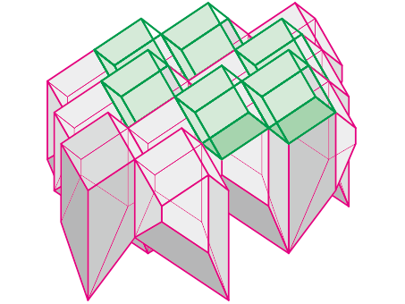 コランダム